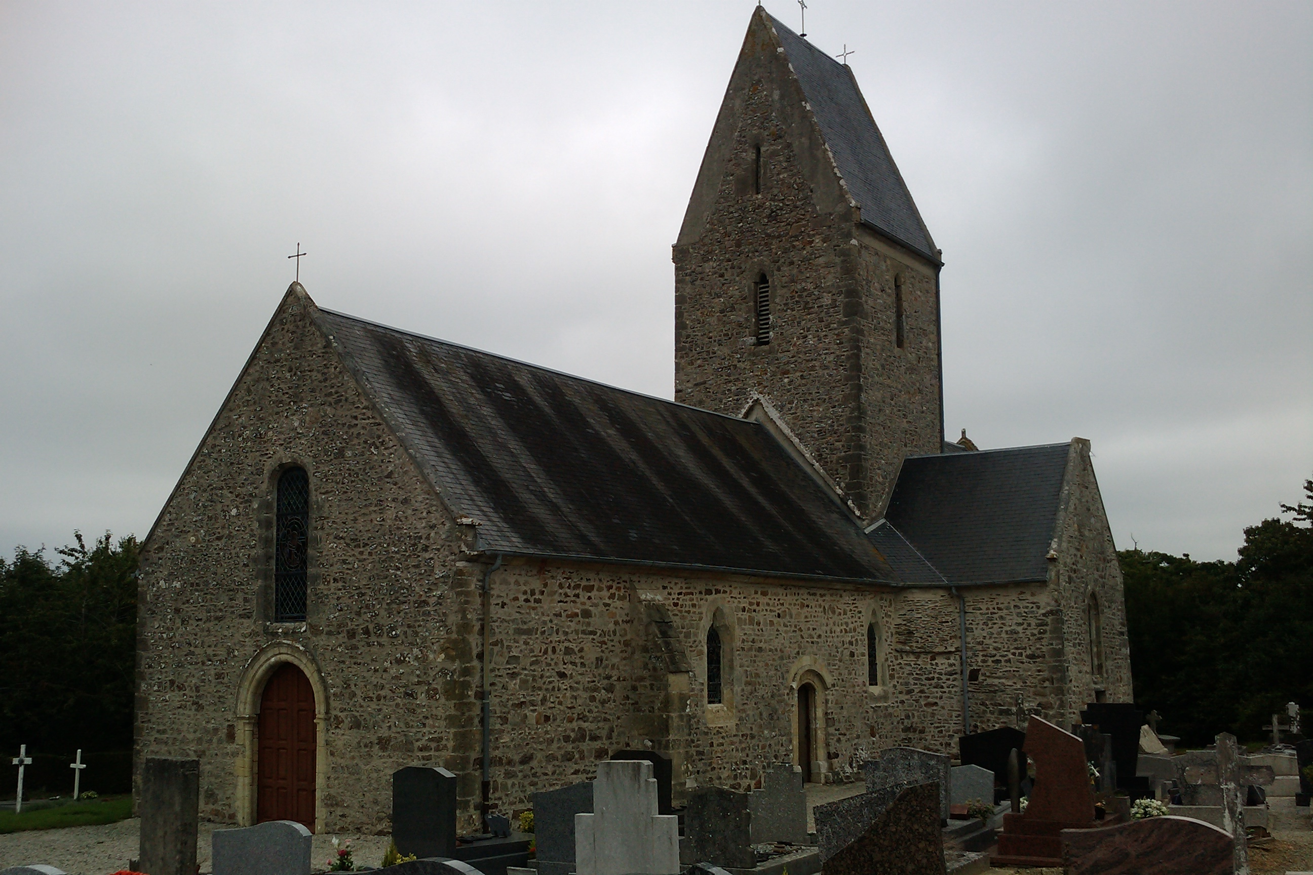 Église de Mobecq